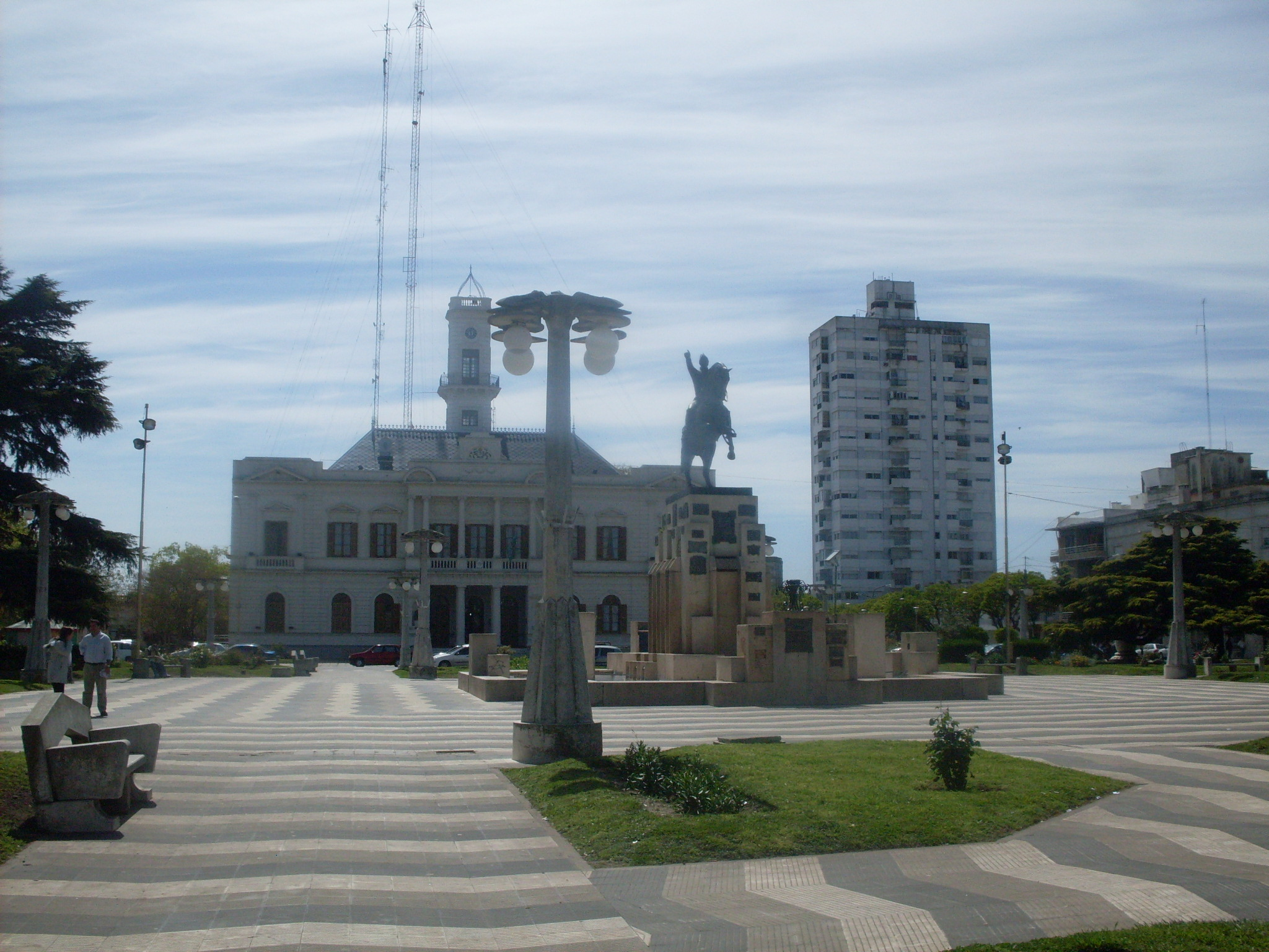 Plaza San Martín, Azul, Buenos Aires.